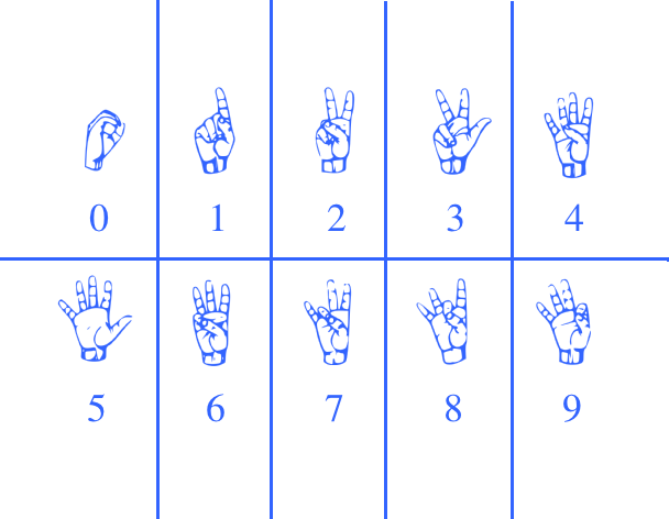 الارقام في لغة الاشارة الامريكية